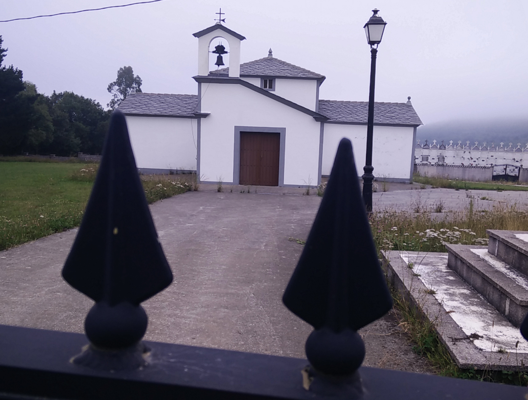 Igrexa en Santo Andrés de Loboso, A Pastoriza (Lugo)